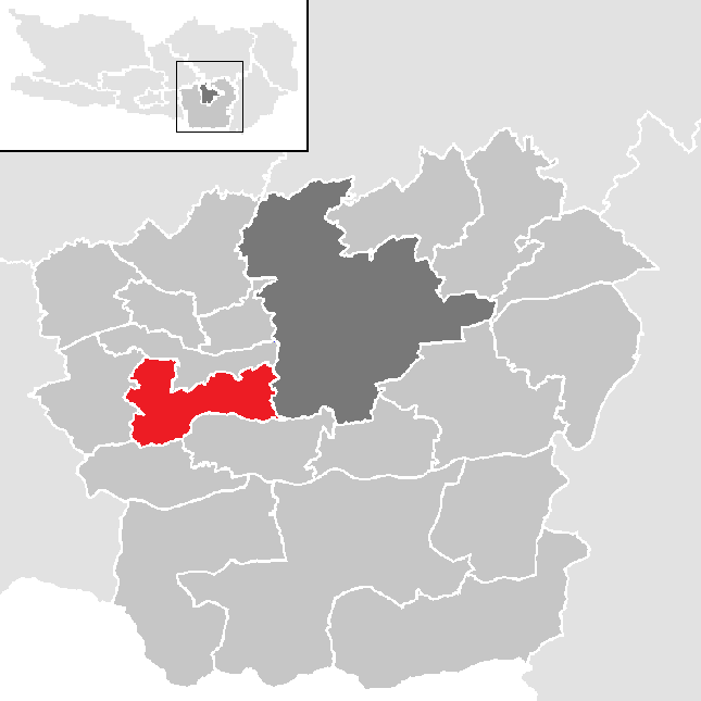 Bezirk Klagenfurt-Land